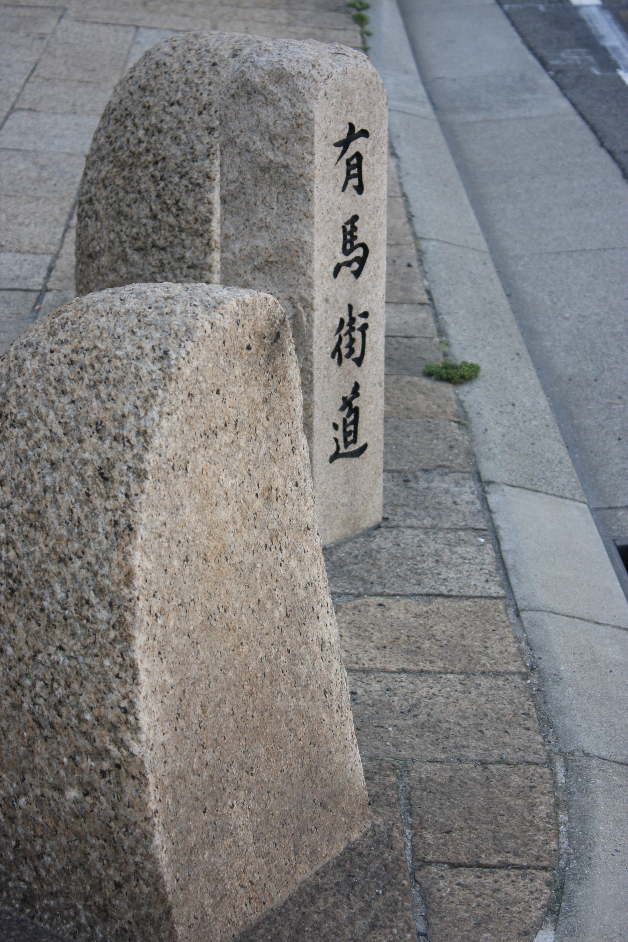 有馬街道 平野付近